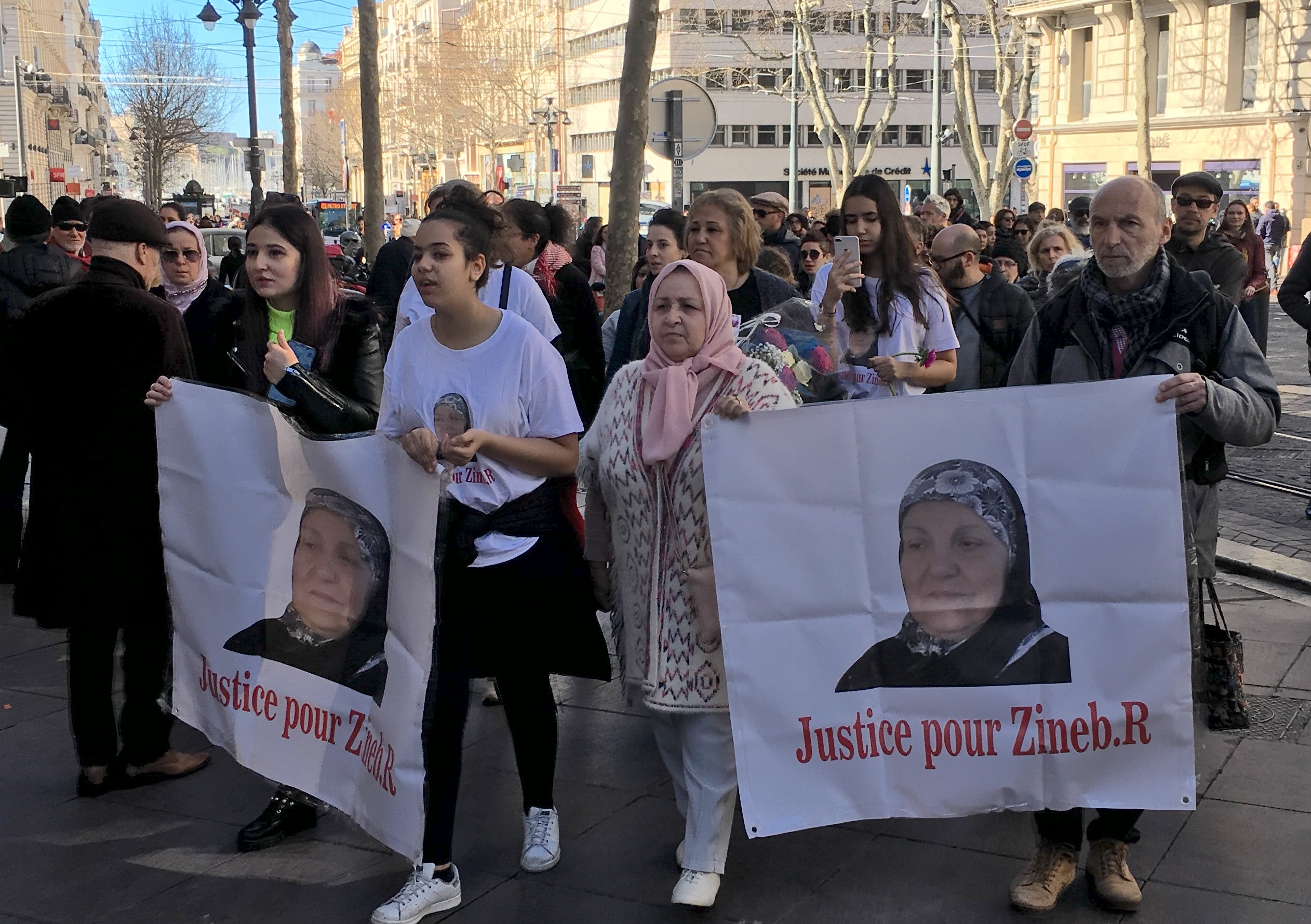 Manifestation à l'initiative de la famille de Zineb Redouane, à Marseille le 2 mars 2019